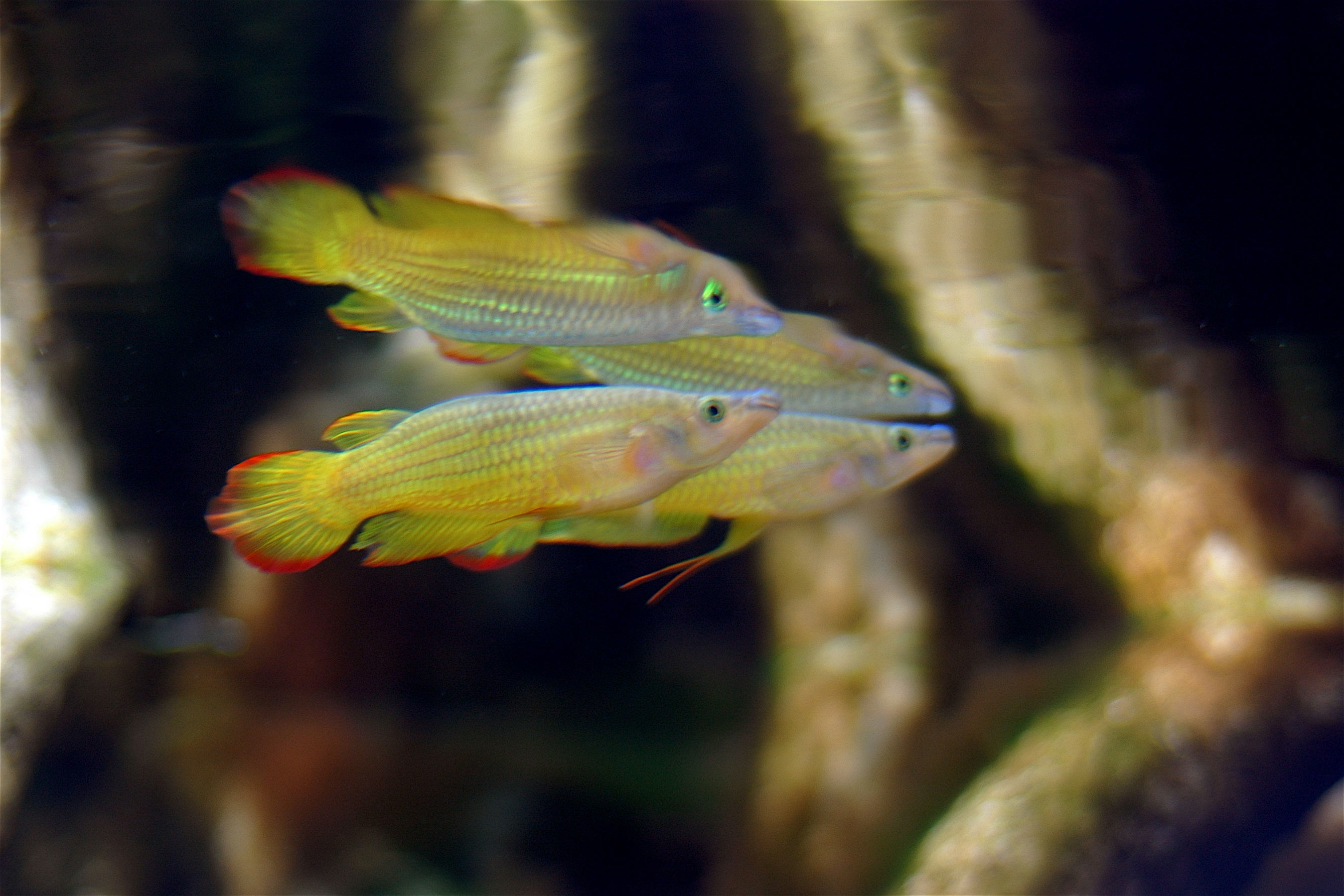 Streifenhechtlinge (Aplocheilus lineatus), goldene Zuchtform